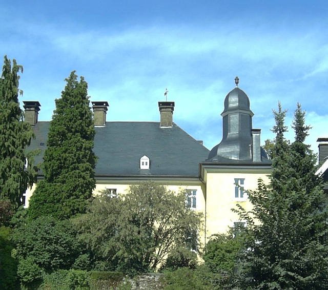 Schloss Antfeld, Olsberg, Germany.